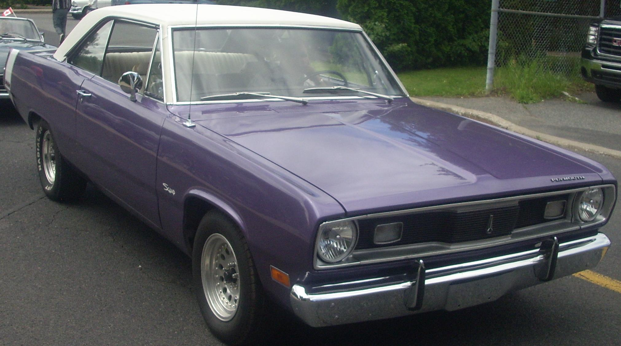 1971 Plymouth Valiant Scamp photographed in Saint-Bruno-de-Montarville, Quebec, Canada at Rassemblement Saint-Bruno-de-Montarville 2010.